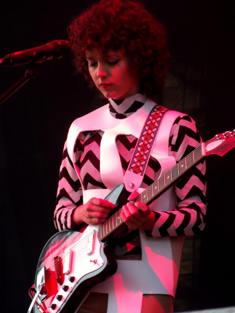 Zdjęcie zrobione podczas drugiego dnia Life Festivalu 2013 w Oświęcimiu.